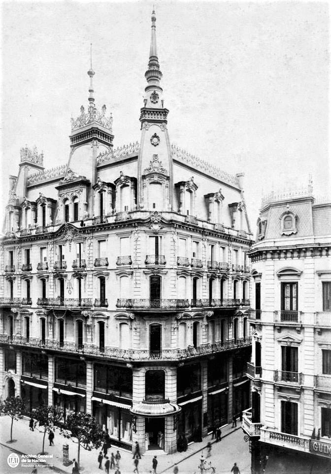 Tienda a la Ciudad de Londres, esquina Avenida de Mayo y Perú, barrio de Monserrat, Buenos Aires.